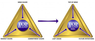 Diagram Top Brand Model